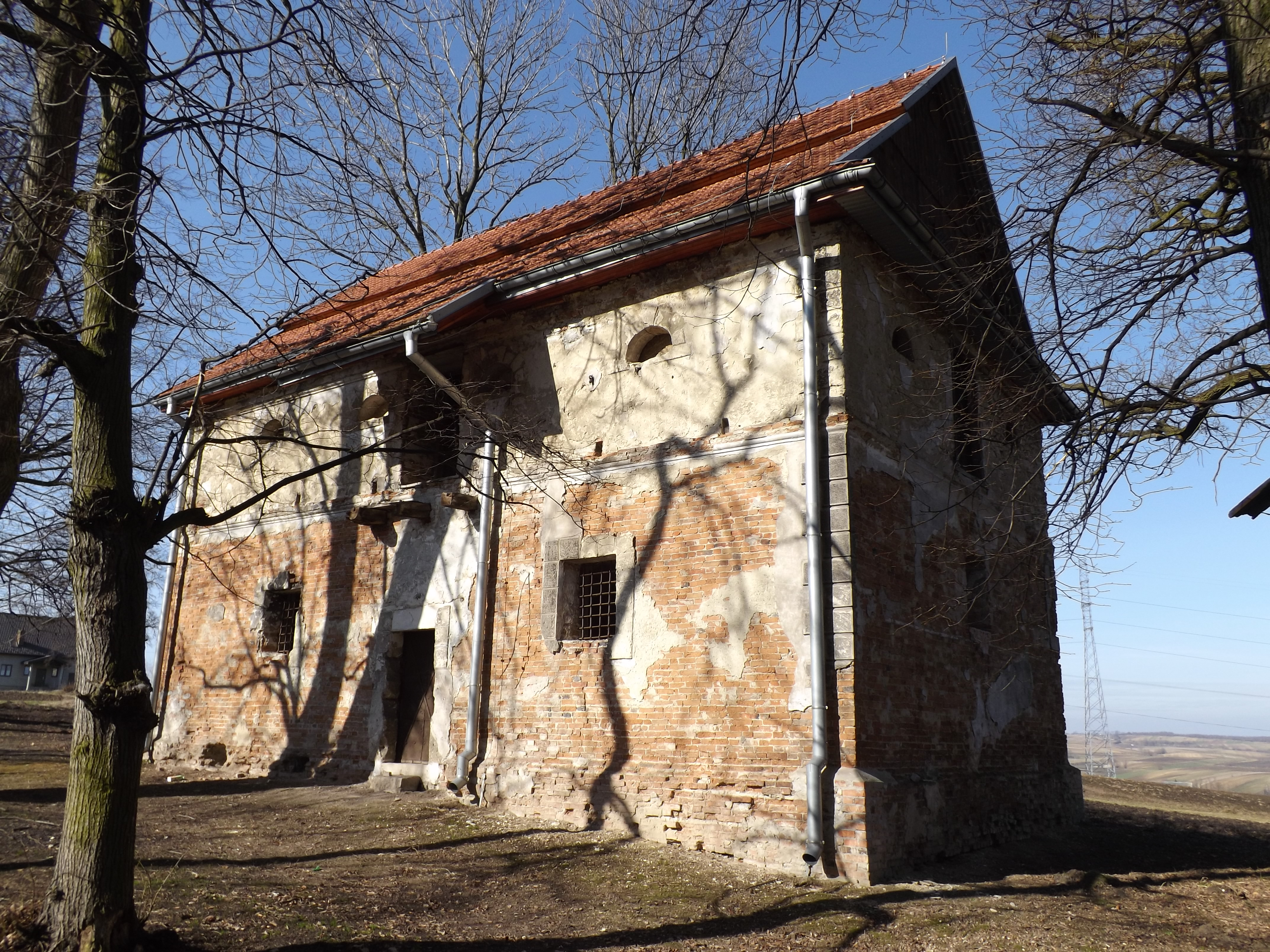 Cieszkowy Zbór Braci Polskich